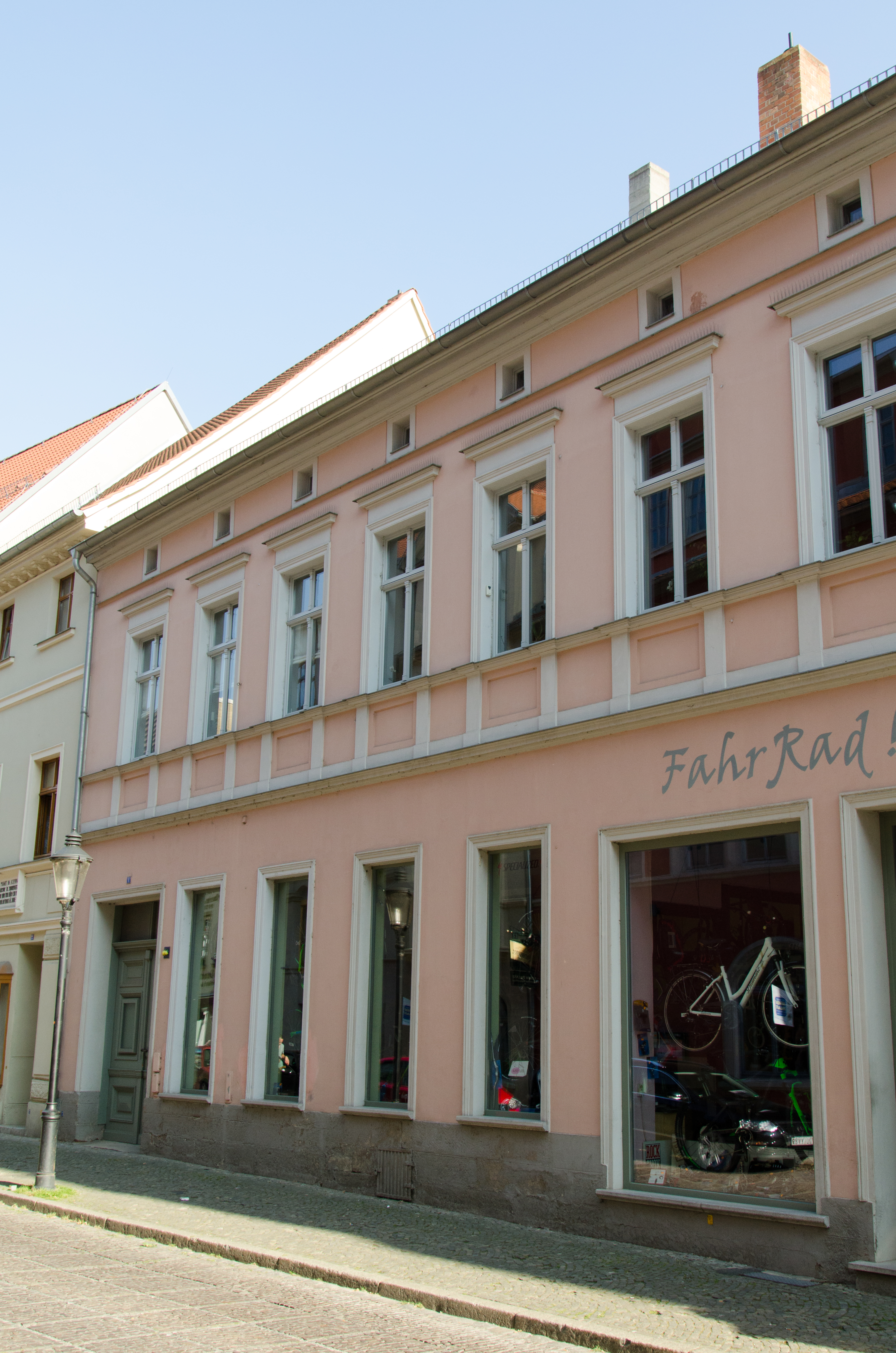 Naumburg, Marienstraße 1